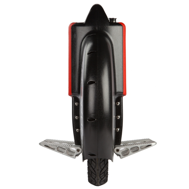 Solowheel / Frontansicht